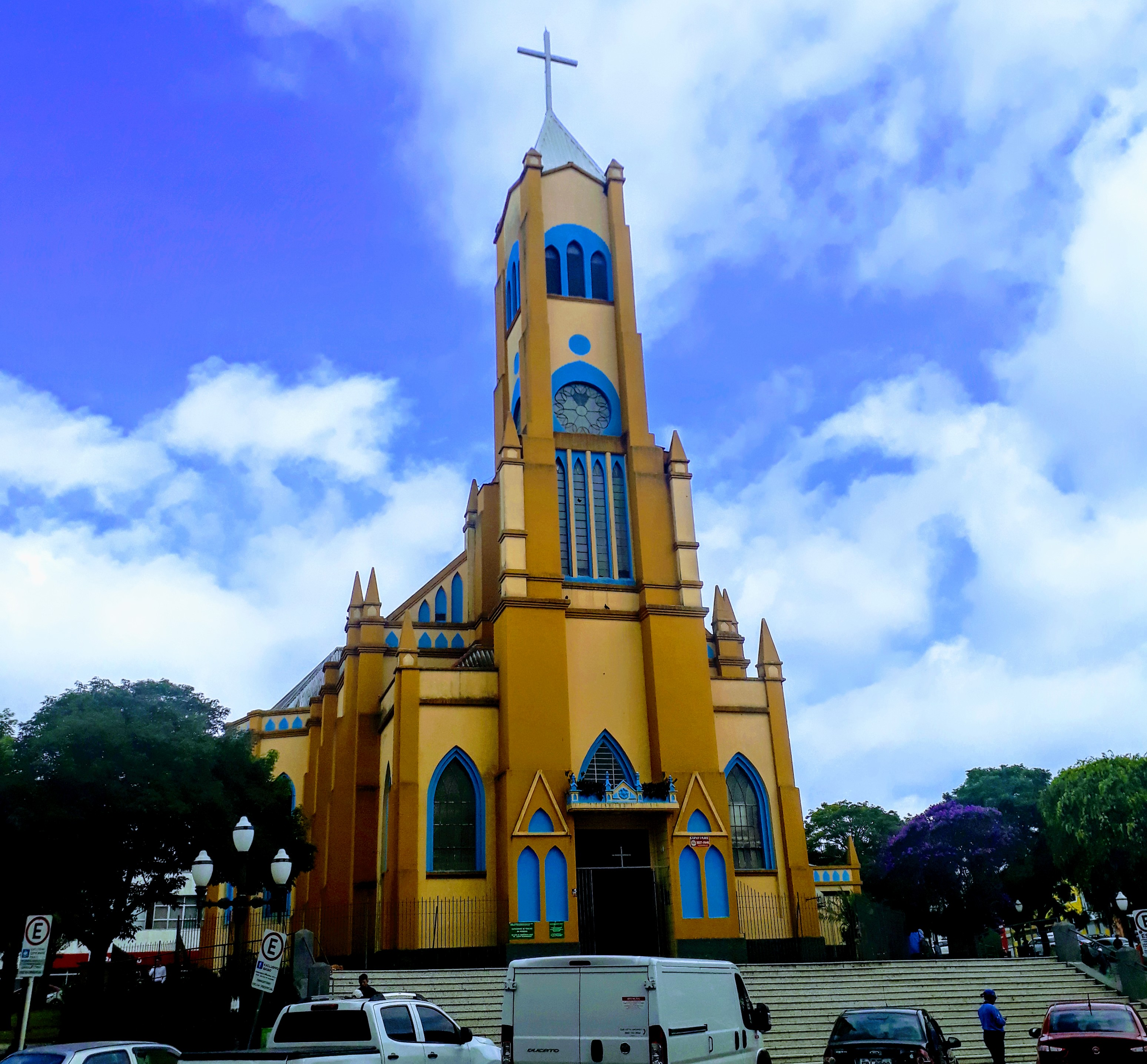 A Igreja Sagrado Coração de Jesus, popularmente conhecida como Igreja dos Polacos (ou Igreja dos Poloneses), é uma igreja fundada em 1898 pela comunidade de imigrantes poloneses católicos na cidade de Ponta Grossa, na região dos Campos Gerais. Com o passar dos anos e o crescimento da comunidade, a igreja se tornou pequena, sendo neste mesmo lugar construída em 1928 em estilo gótico a atual igreja. Está localizada na Praça Barão de Guaraúna, 173 - Centro, Ponta Grossa, Paraná.